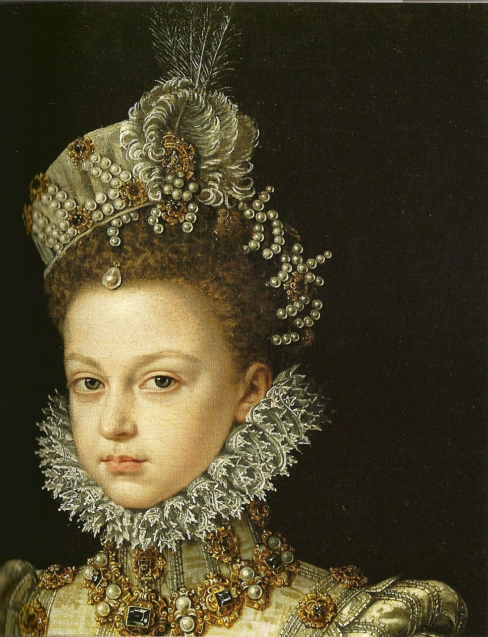 Retrato de la infanta Isabel Clara Eugenia (1566-1633), que fue hija del rey Felipe II de España, esposa del archiduque Alberto de Austria y también soberana y posteriormente gobernadora de los Países Bajos.